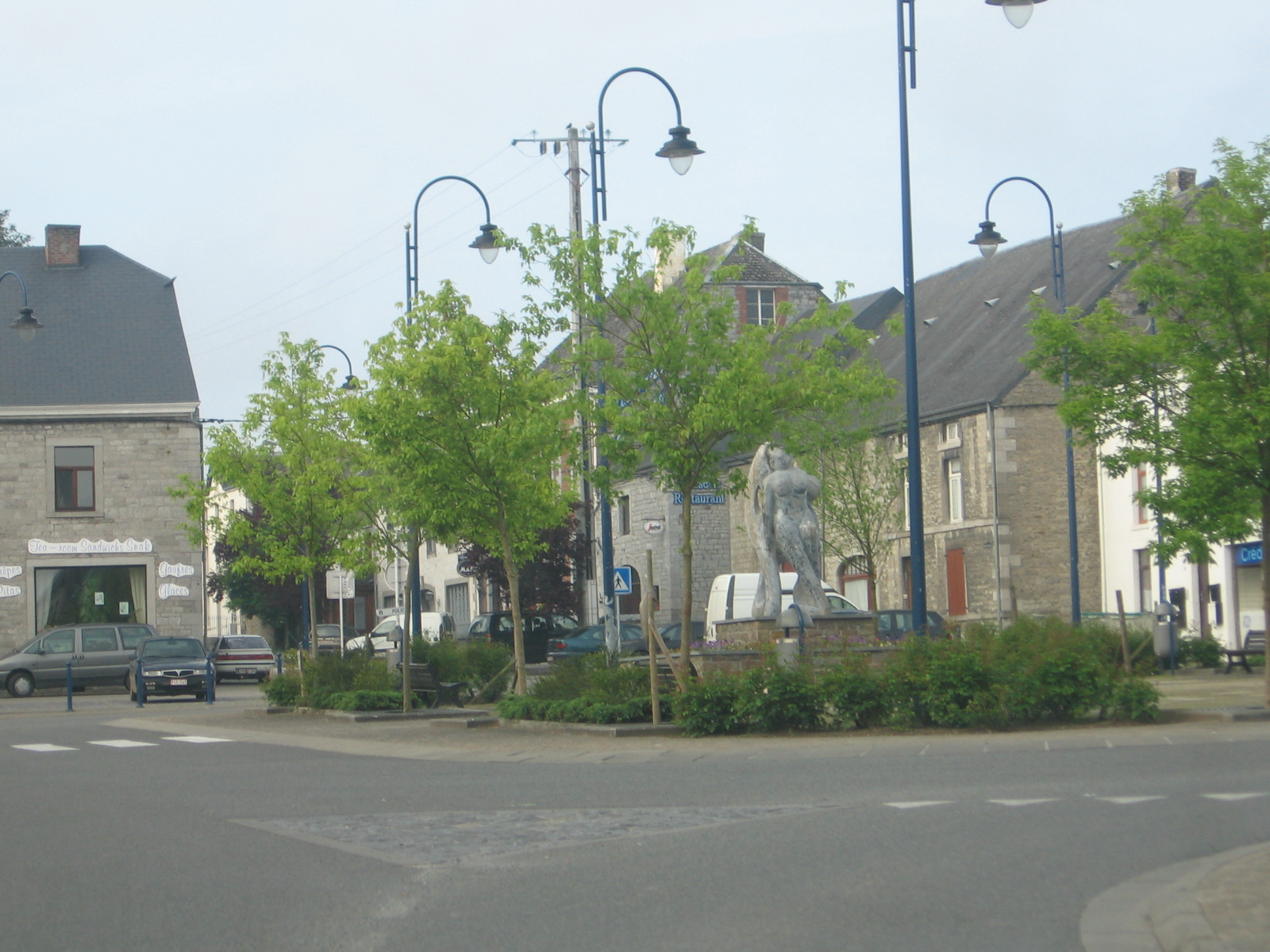 Wellin